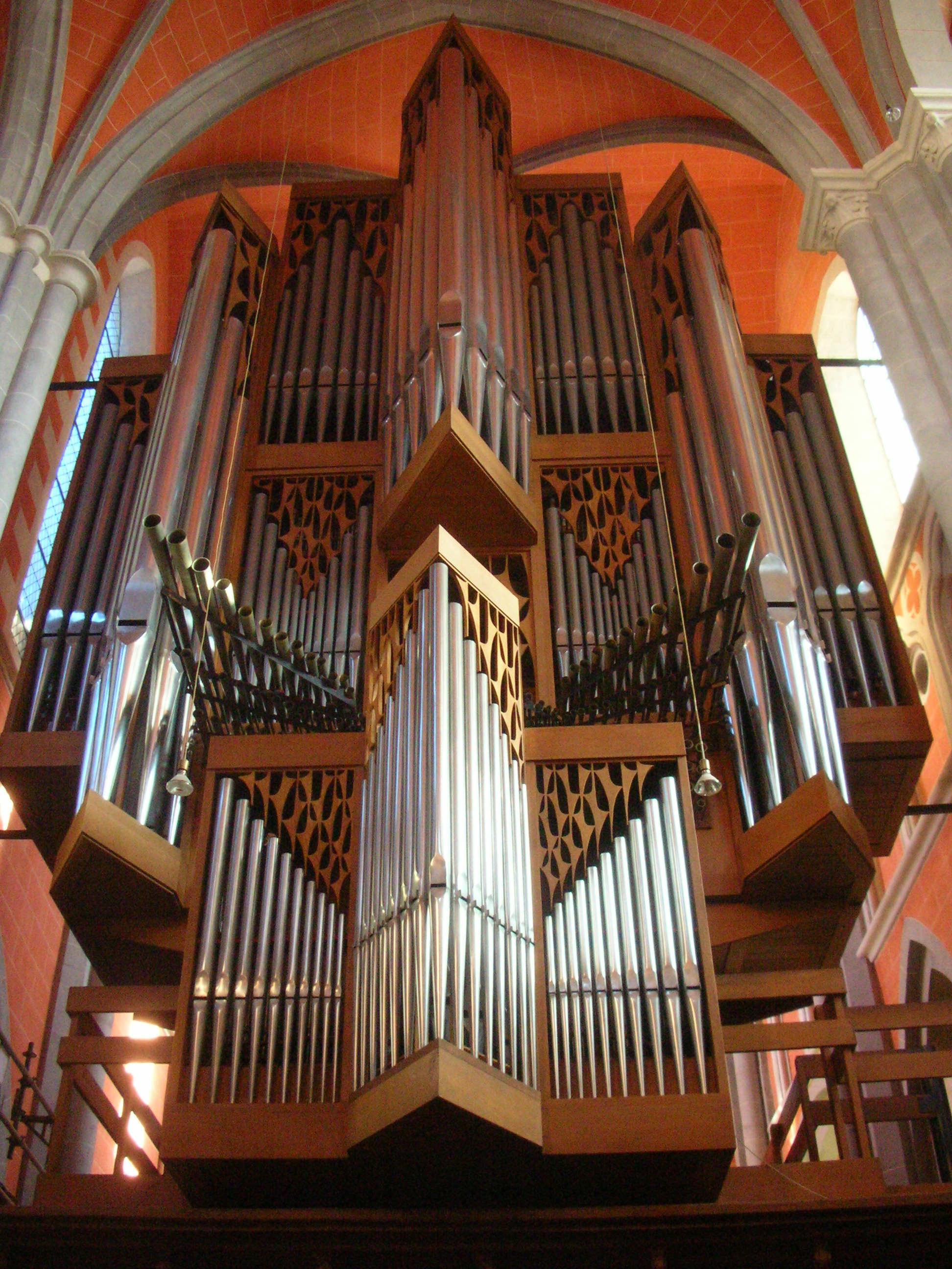 Blick auf die Rieger-Orgel